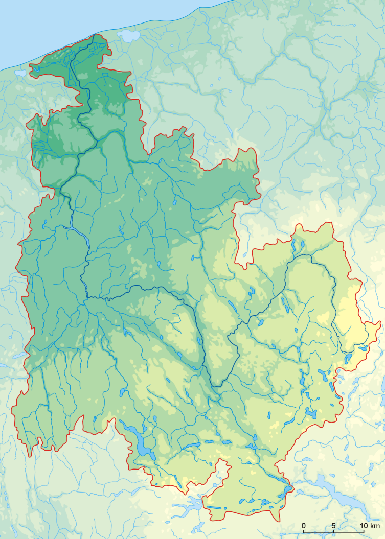 Dorzecze Regi na tle ukształtowania terenu. Zaznaczono poziomice: 20, 60, 100, 140 i 200 m